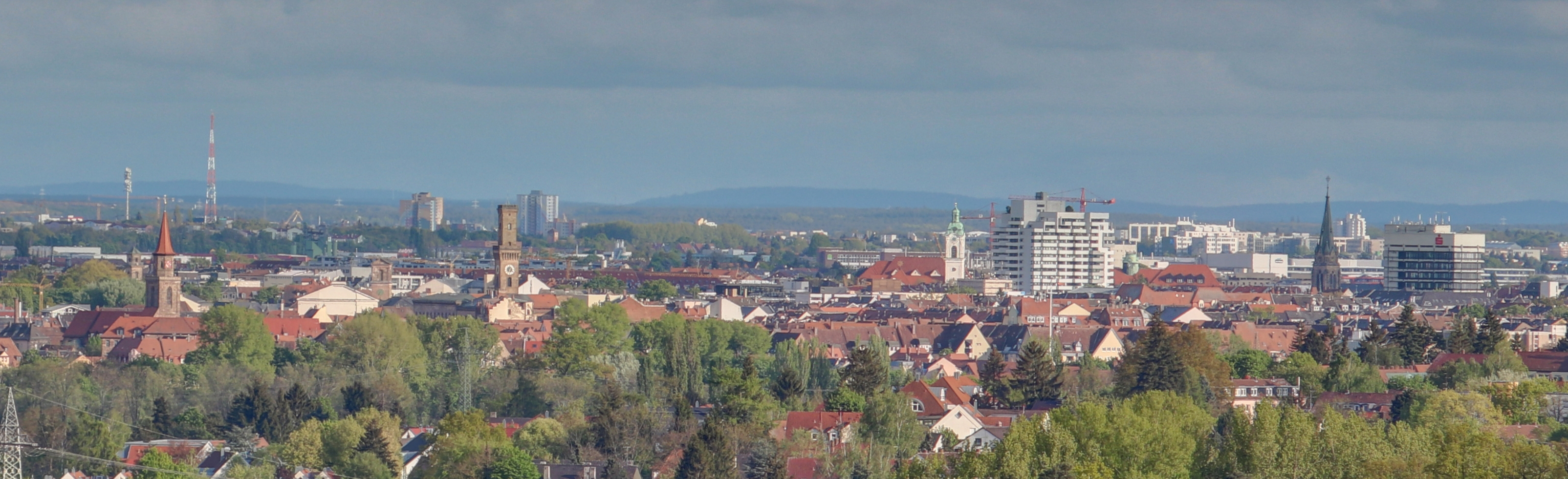 Panorama von Fürth gesehen vom "Solarberg" (seieh "Objektposition"), im linken Bildteil die Kirche St. Michael und das Rathaus, im rechten Bildteil die Kirchen St. Heinrich und St. Paul